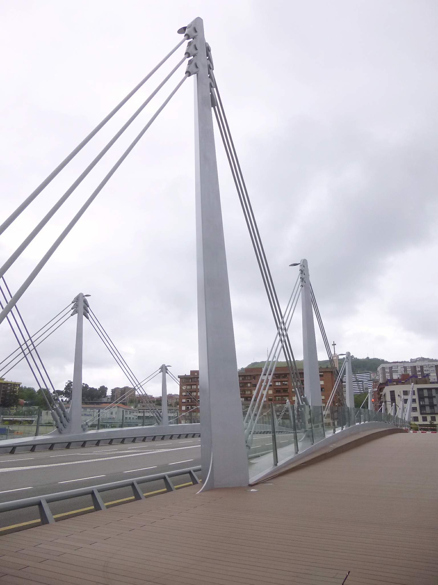 Bilbao - Puente Frank Gehry